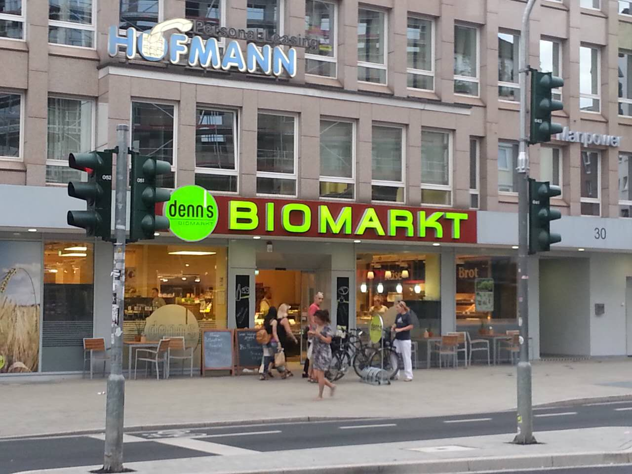 Biomarkt Düsseldorf